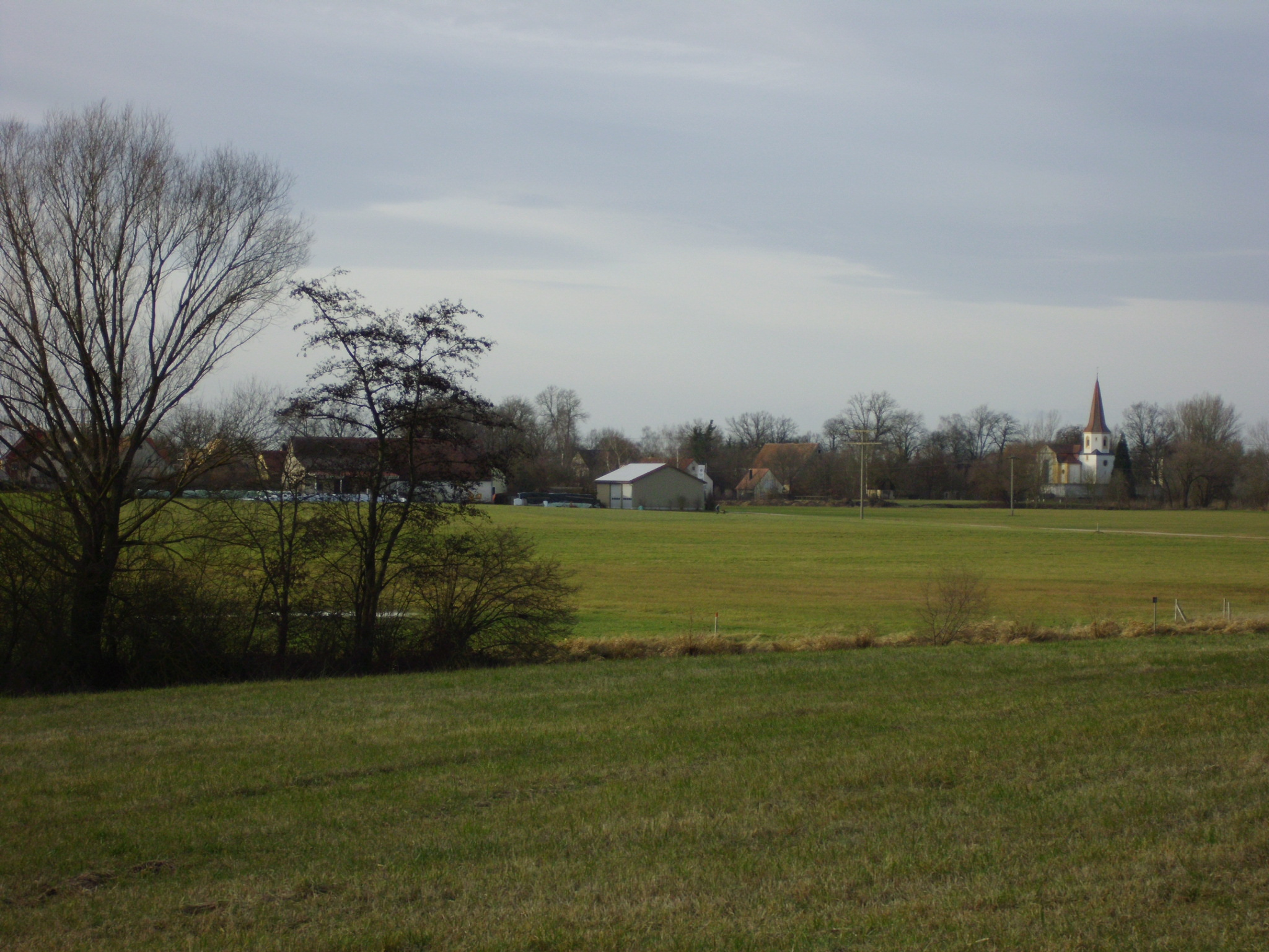 Wald, Ortsteil von Gunzenhausen im Landkreis Weißenburg-Gunzenhausen (Bayern)